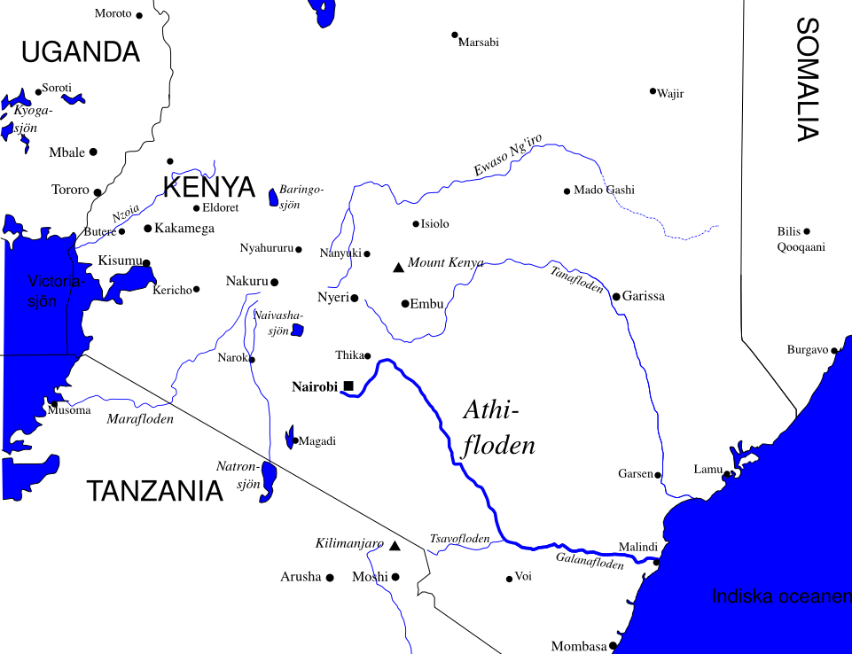 Karta över Athifloden i Kenya.